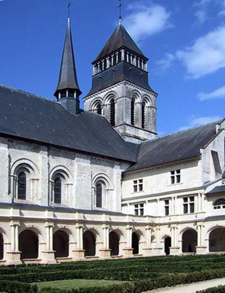 Abbaye de Fontevraud, le cloître du Grand-Moûtier. Vue de l'église abbatiale sur l'aile nord du cloître.